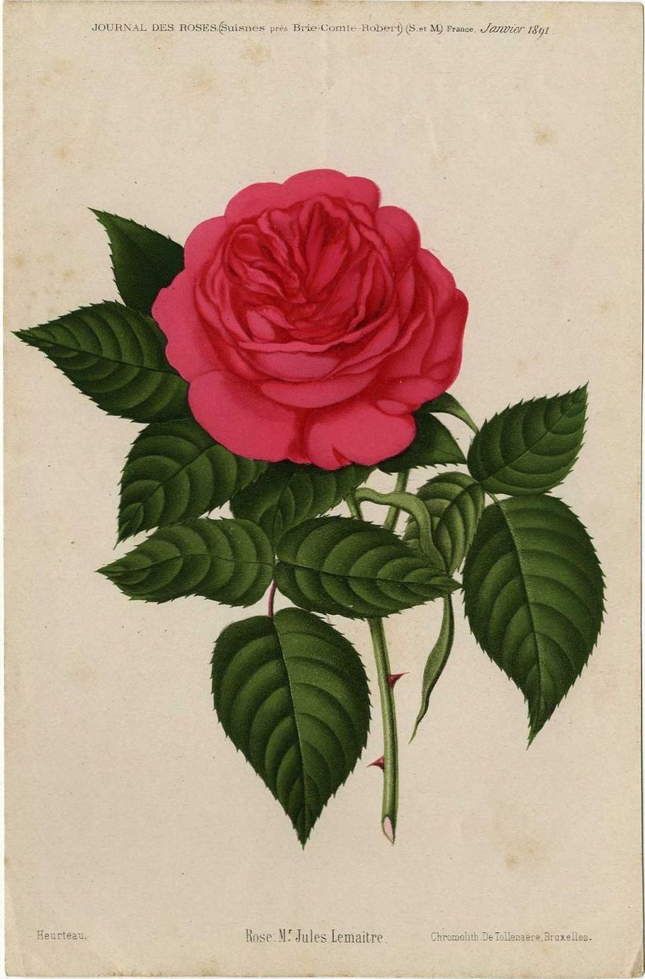 Rose hybride remontant 'Monsieur Jules Lemaître' (Alcide Vigneron 1890), in Journal des roses, janvier 1891.